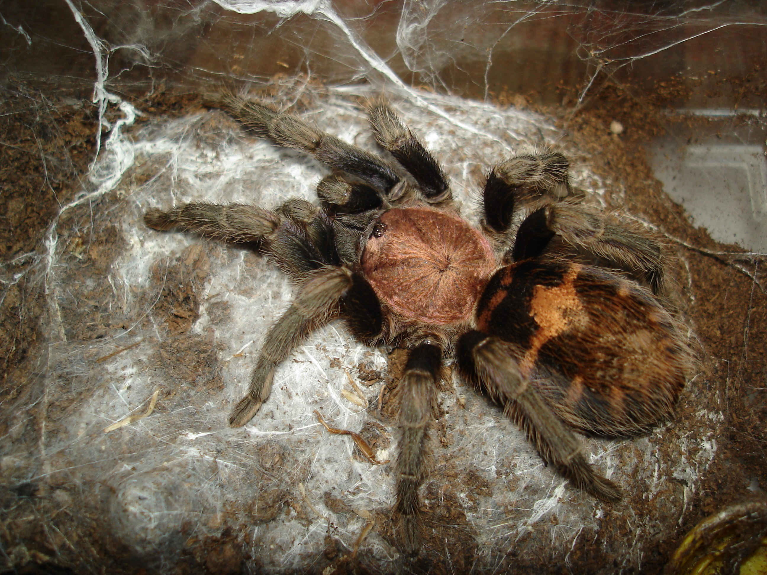 Davus fasciatus, adult female